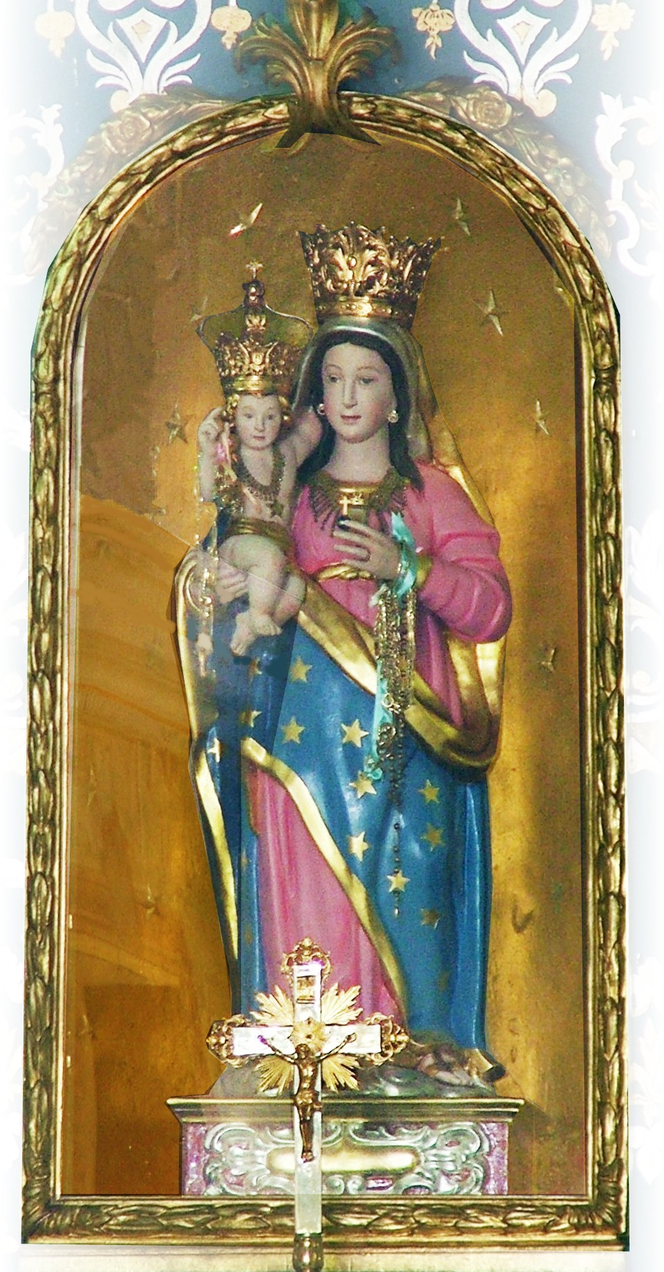 particolare della nicchia dove viene custodita la b.v. maria delle grazie detta della colletta di luzzogno